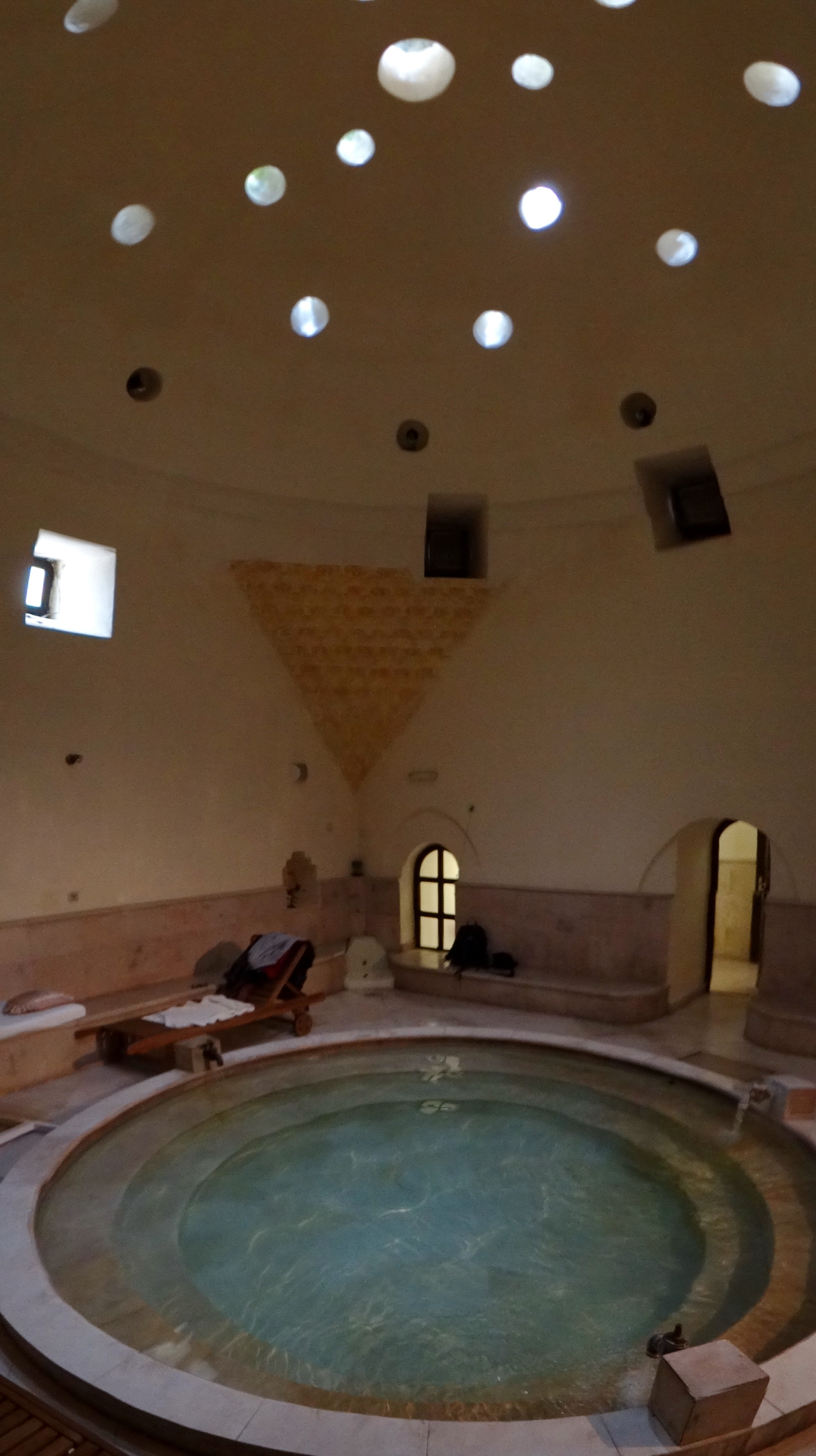 Sokobanja Hammam